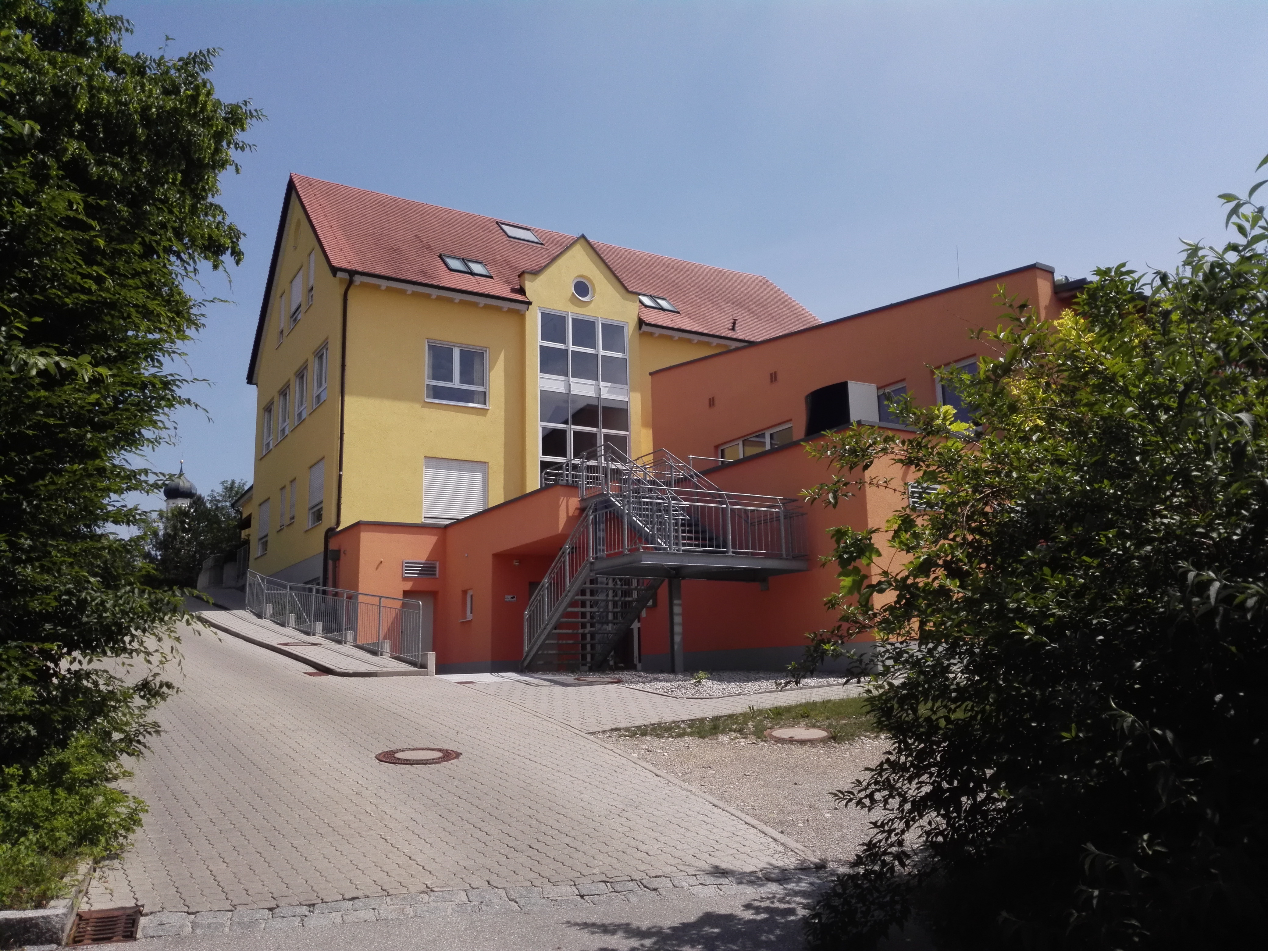 Grundschule, vorm. Volksschule Aufkirchen im Ortsteil Aufkirchen von Egenhofen